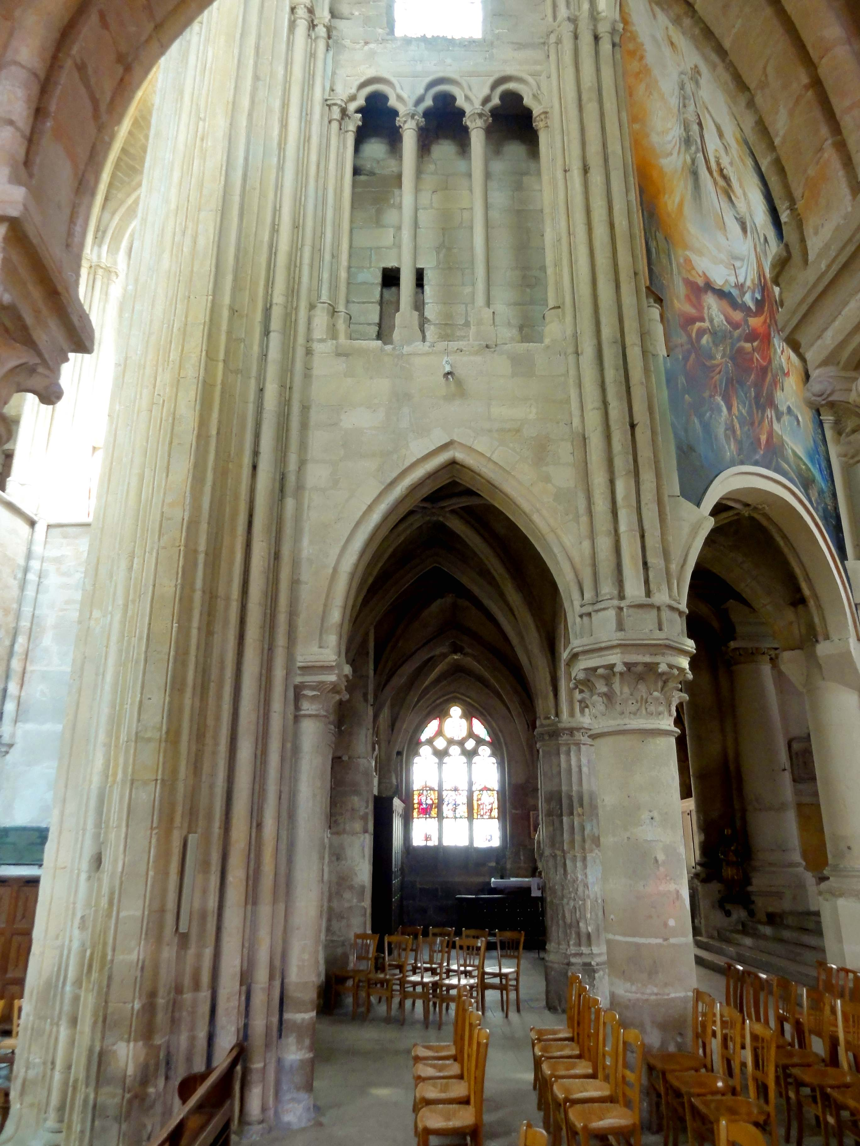 Intérieur de l'église - voir titre.